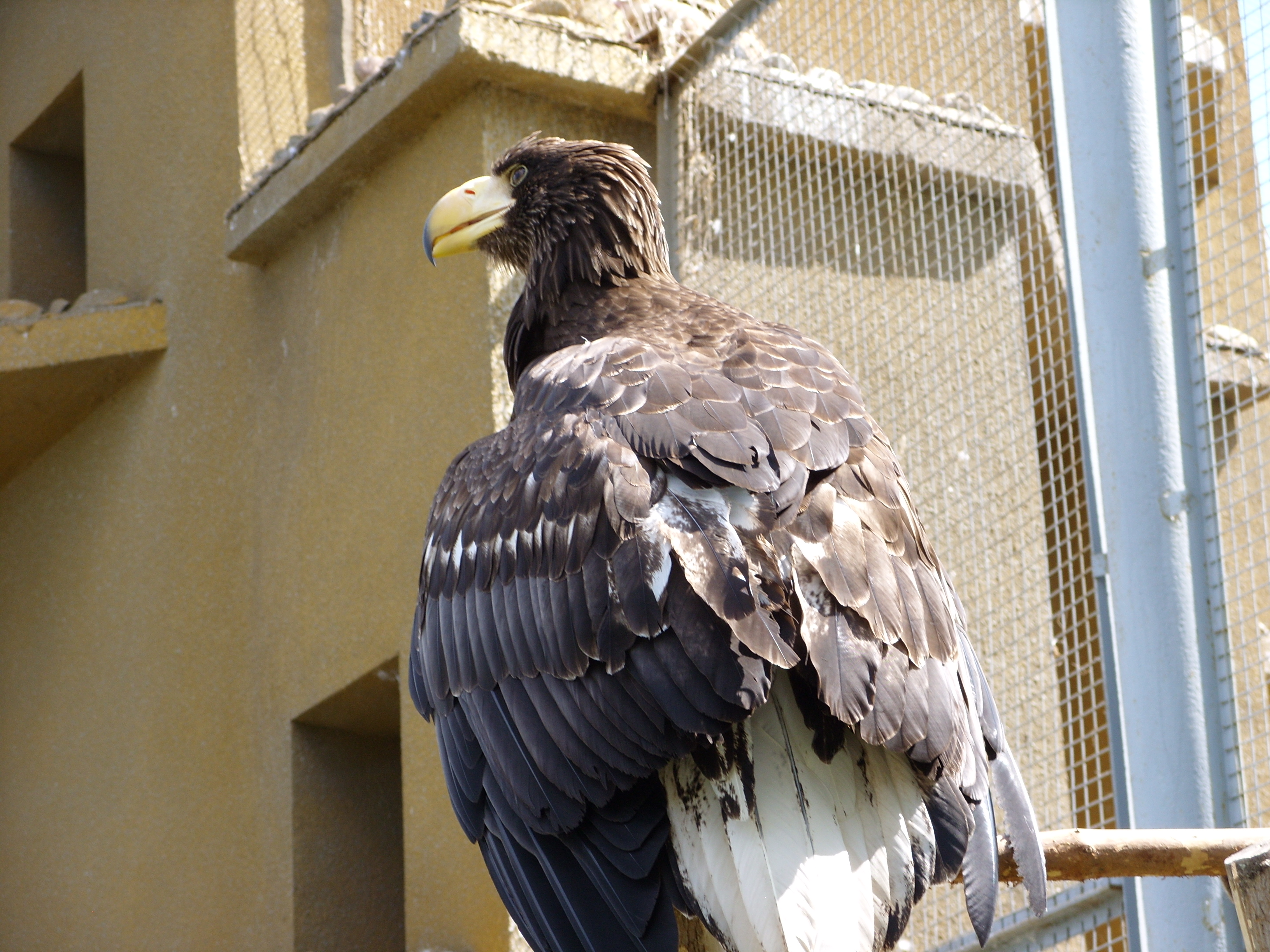 снимки июля 2008 г.